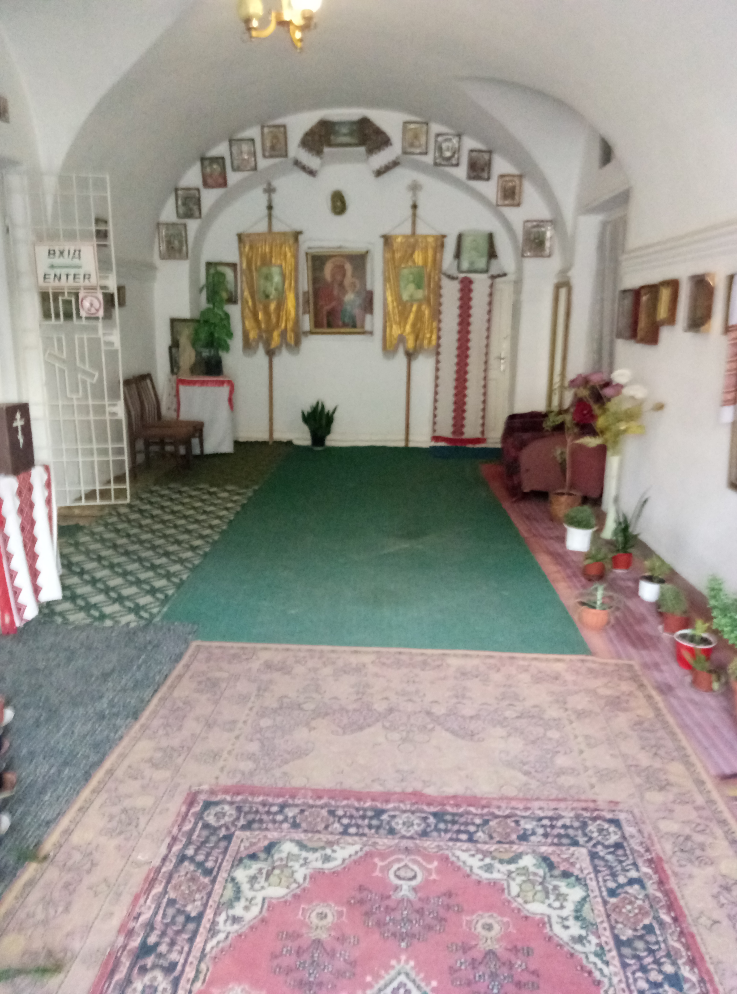 фотографія